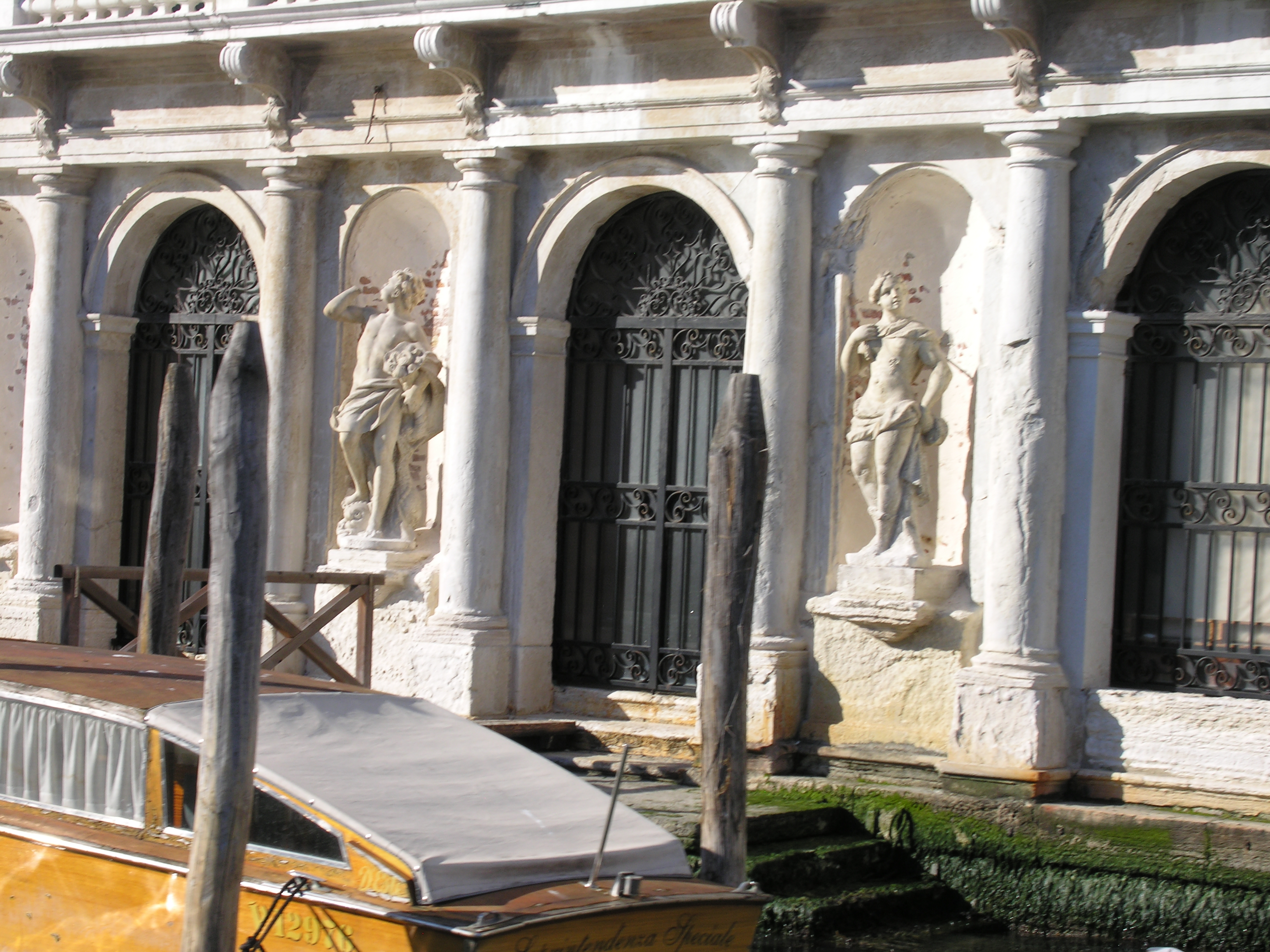 Cannaregio, 30100 Venice, Italy